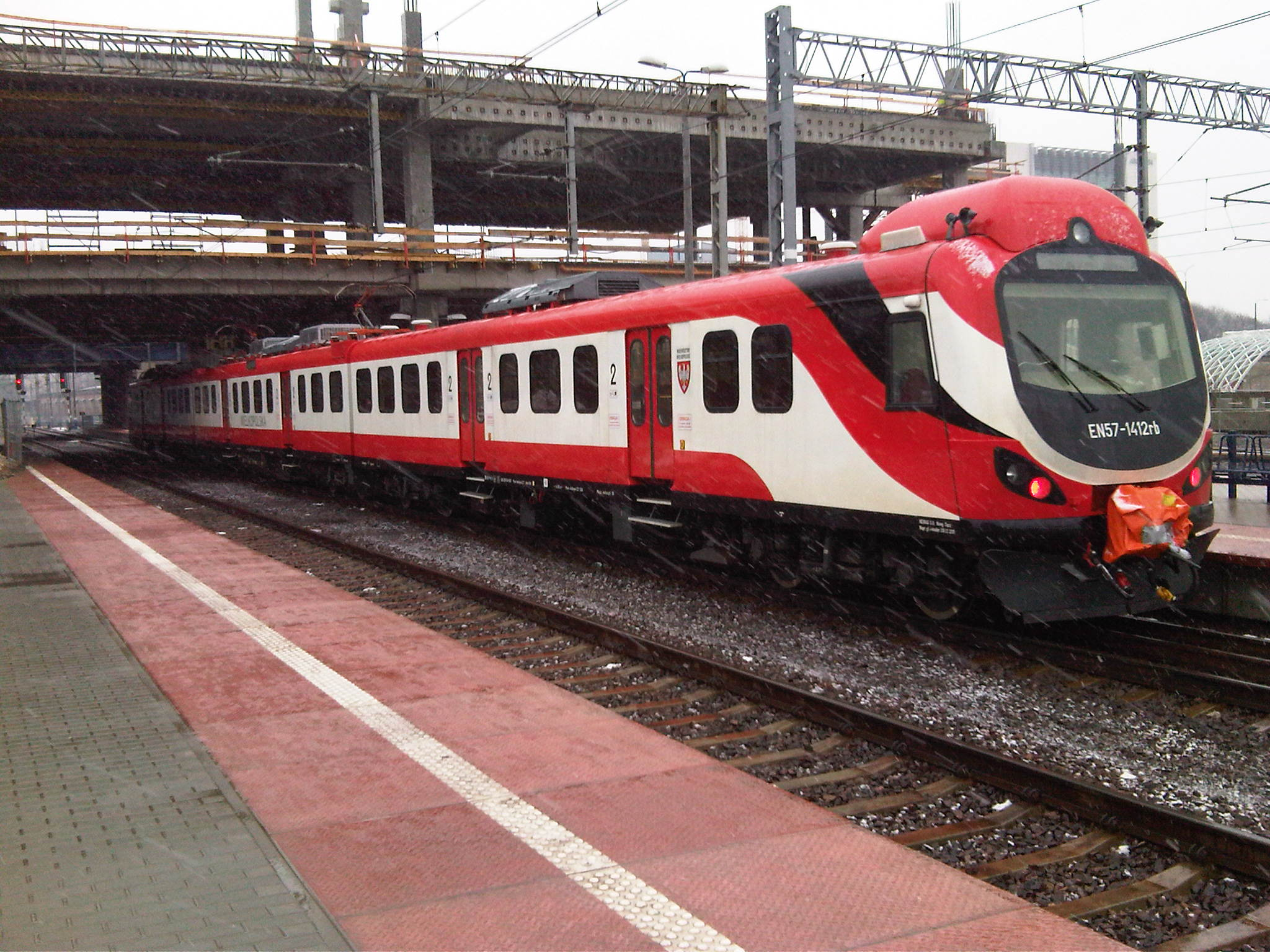 Koleje Wielkopolskie - EN57-1412 na stacji Poznań Główny.